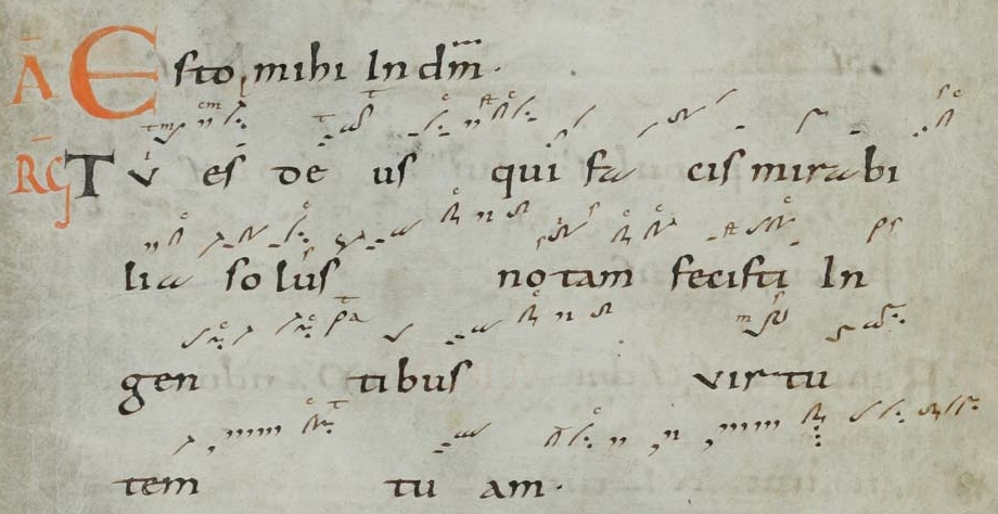 Beginn des Graduales Tu es Deus aus dem Cantatorium St. Gallen, enthalten im Codex Sangallensis 359. Ausgeprägte Akzentnotation mit vielen „litterae significativae“.